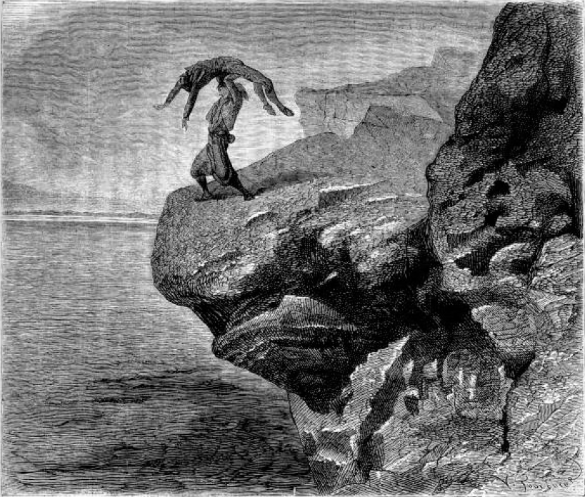 Illustration de Jean-Valentin Foulquier pour le roman historique de Jules Verne Le Comte de Chanteleine.